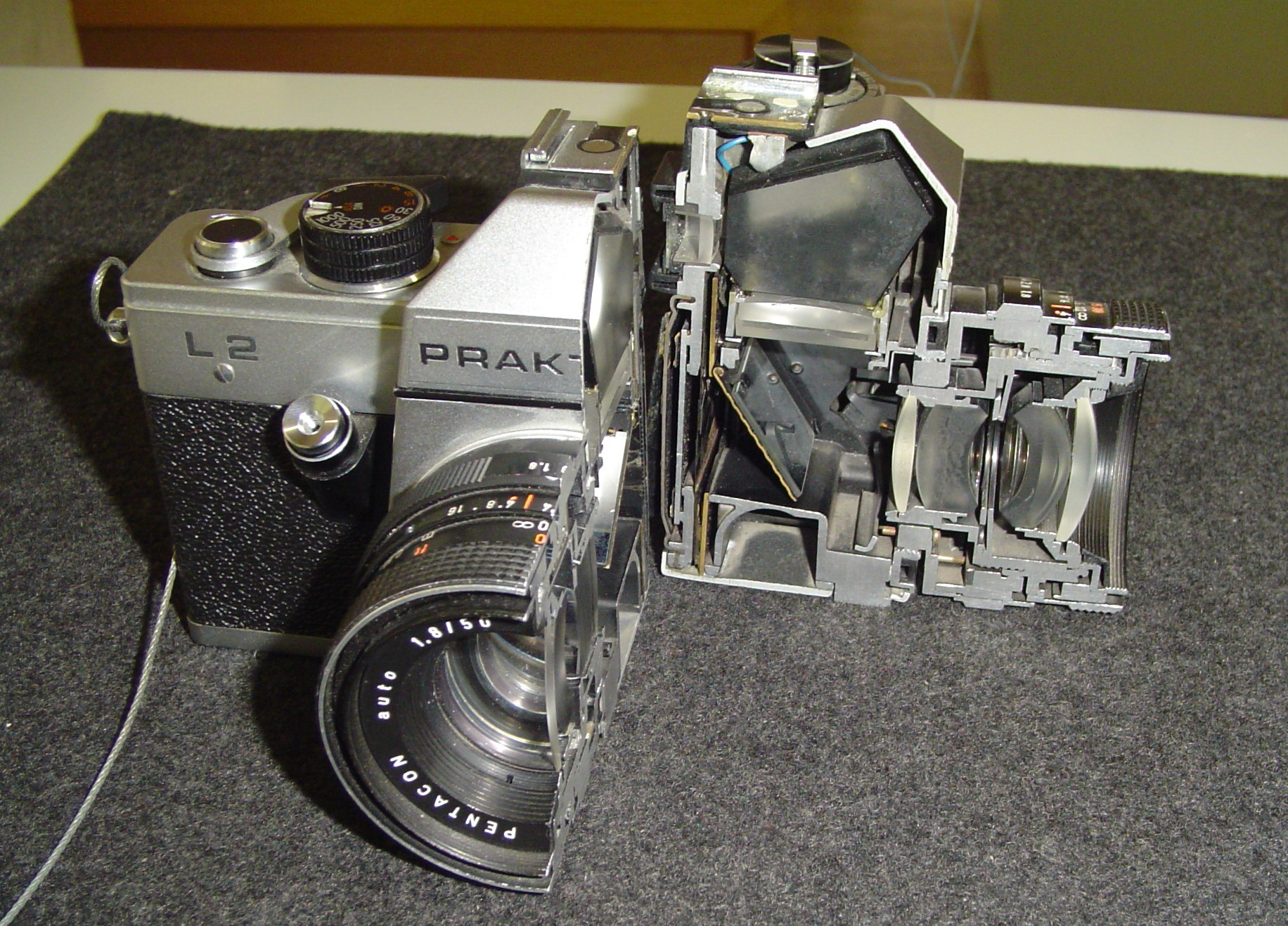 mechanische Spiegelreflex Practica